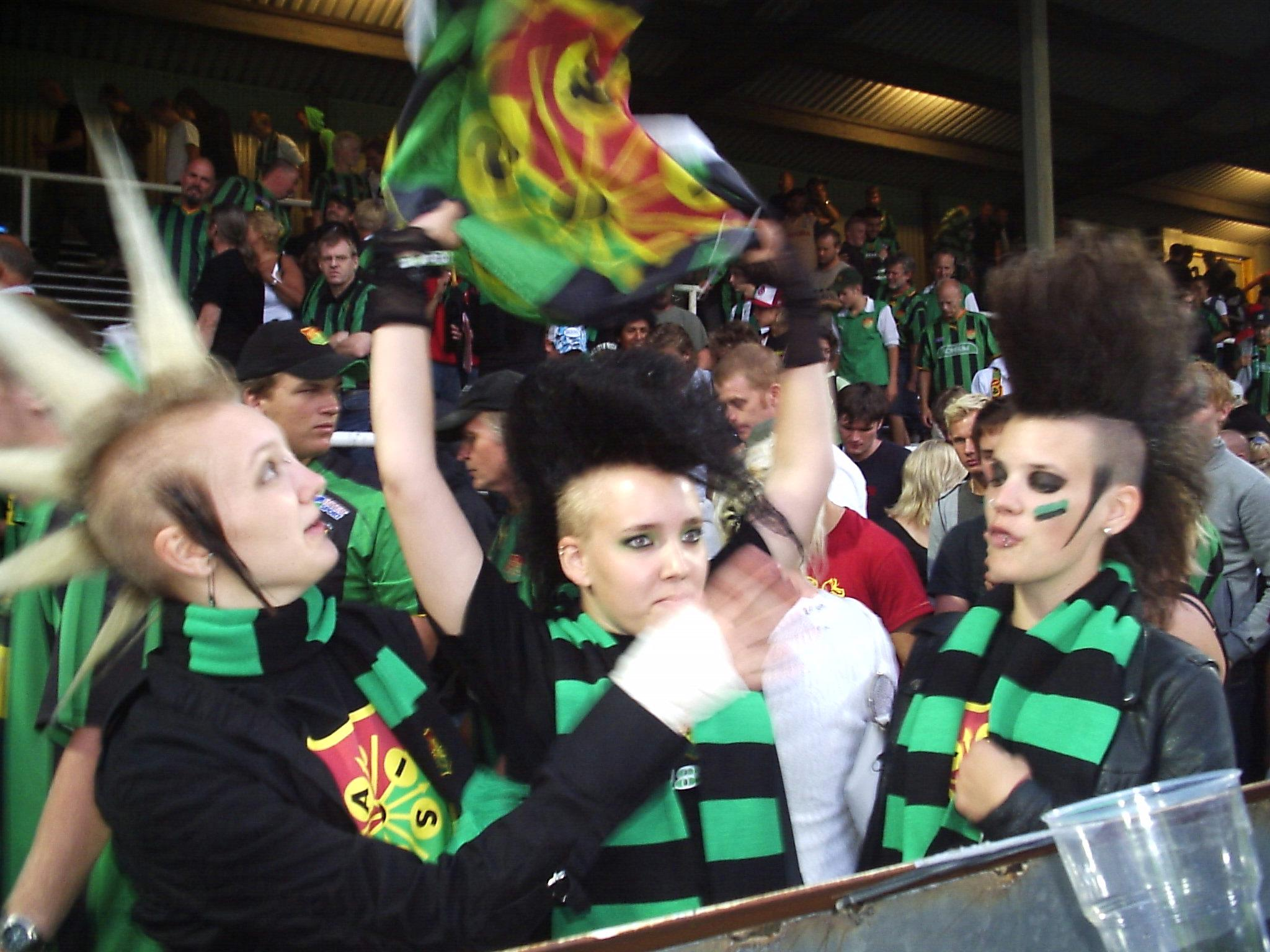 Allsvenskan soccer game, GAIS-BK Häcken (2-2) at Gamla Ullevi in Gothenburg, Sweden on 9 August 2006.